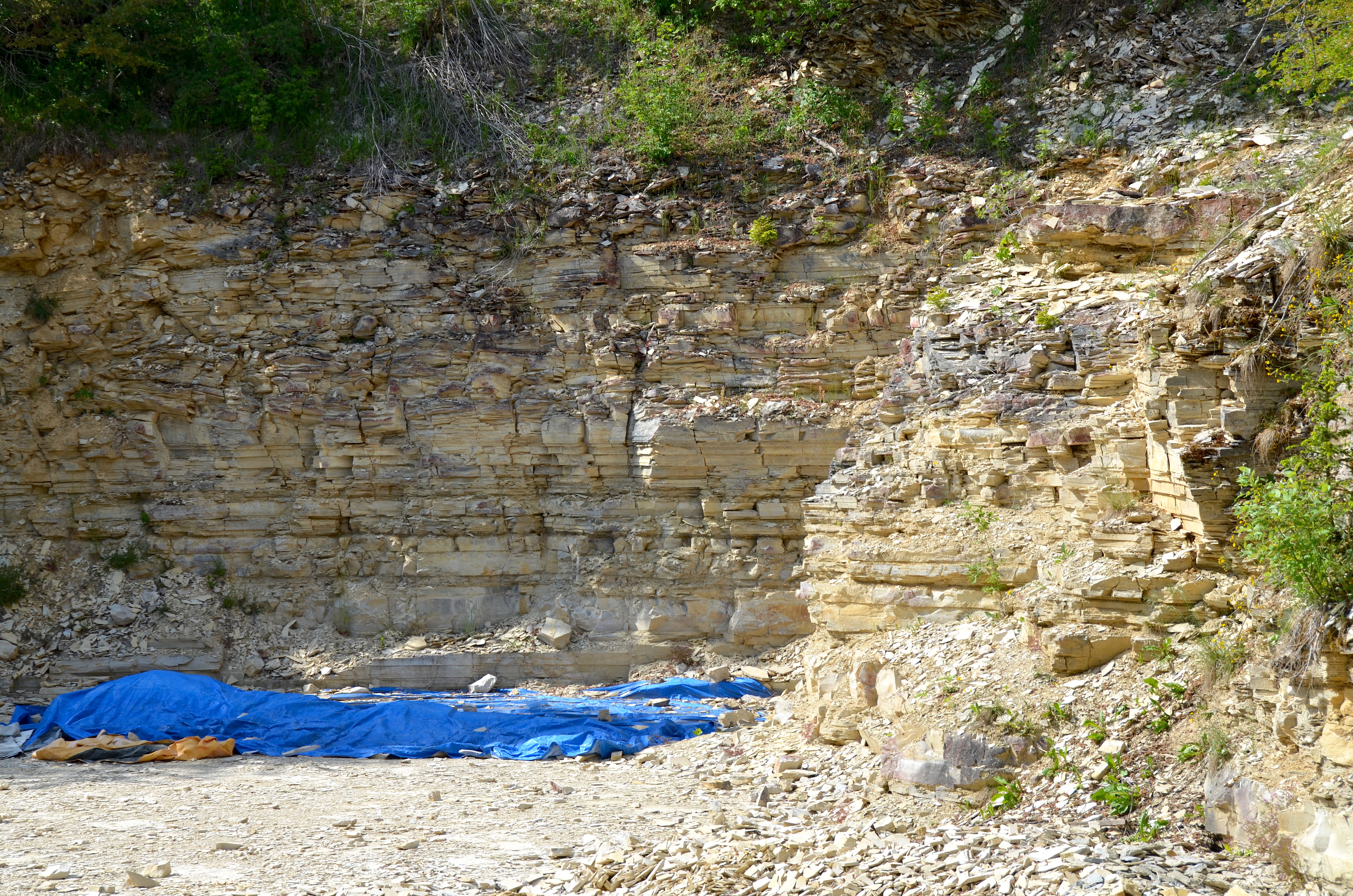 Plattenkalk-Steinbruch im Naturschutzgebiet Westerberg bei Nusplingen, Wasserschutzgebiet Scheibenbühlquellen, Naturraum Hohe Schwabenalb, Naturpark Obere Donau, Vogelschutzgebiet Südwestalb und Oberes Donautal, FFH-Gebiet Östlicher Großer Heuberg, Biotopkomplex Gewann Steinbühl